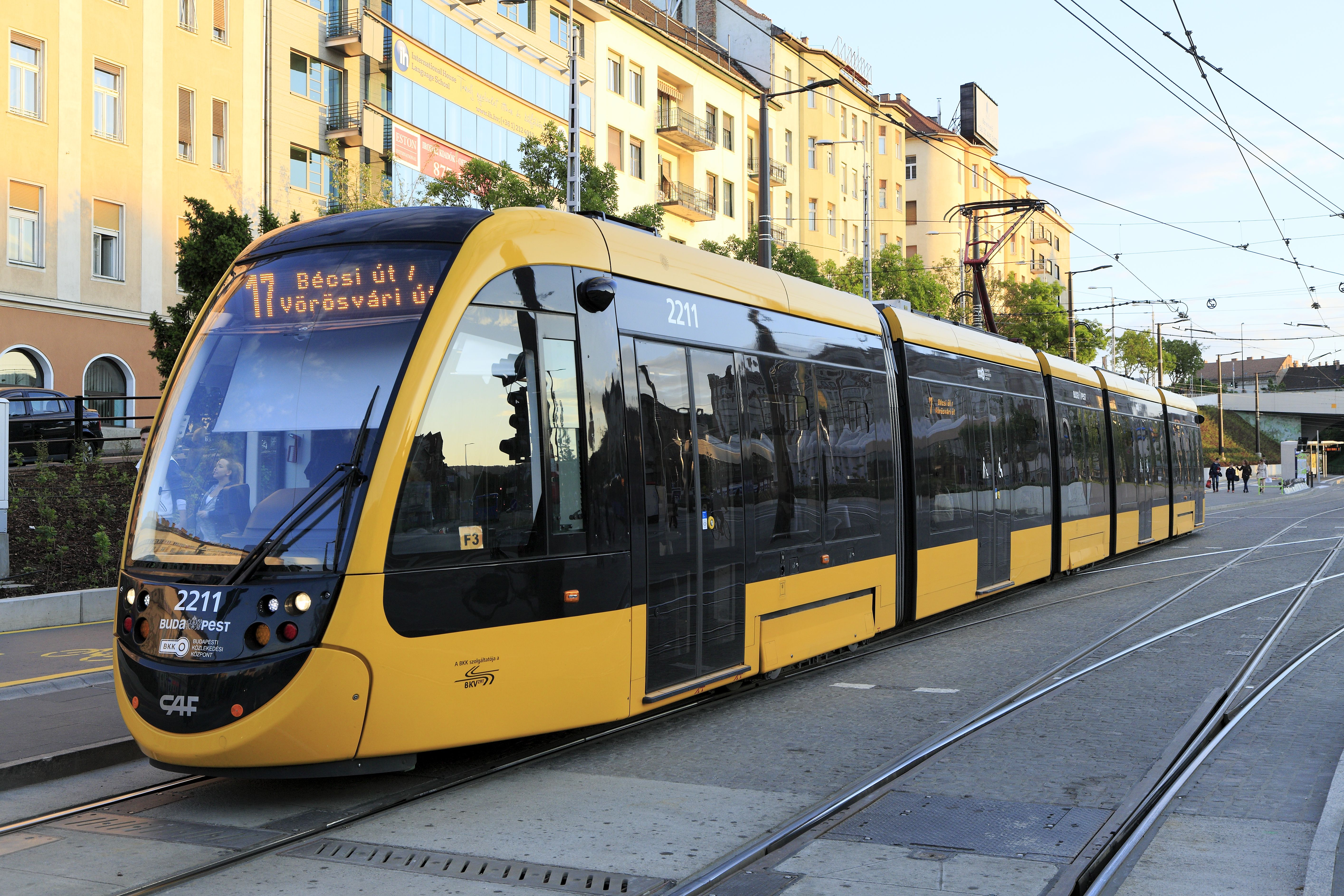 »Urbos 3« von CAF, Linie 17 Savoya Park–Bécsi út (Wiener Straße) beim Verlassen der Haltestelle Széll Kálmán tér Richtung Margit körút. Die Urbos 3 sind wieder Multigelenkwagen mit auffallend großen Überhängen an den Wagenenden.